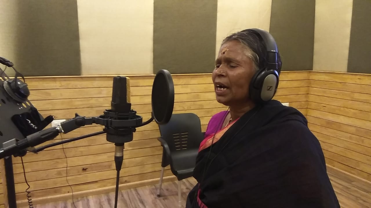 നഞ്ചിയമ്മ